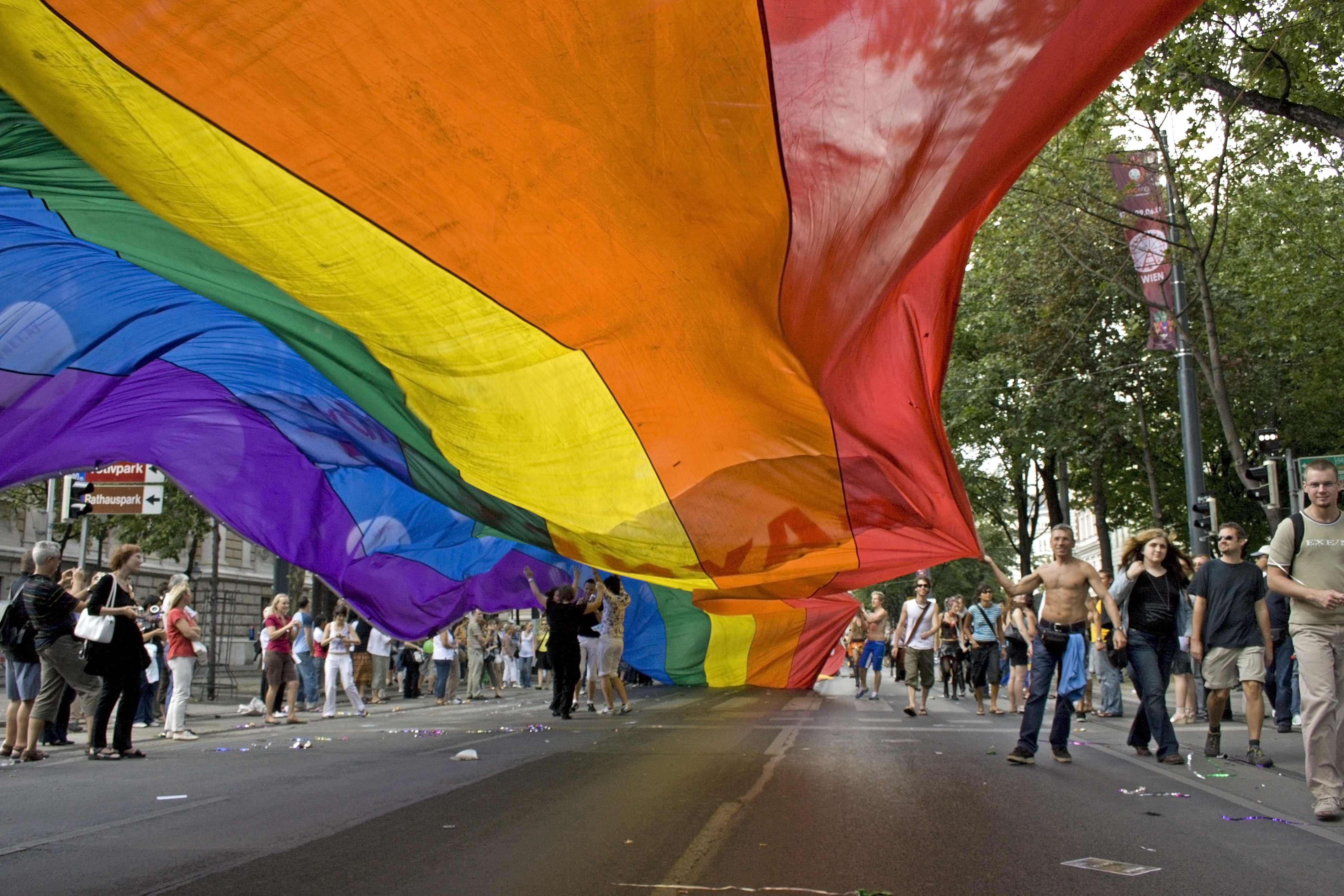 Regenbogenparade 2007, Wien